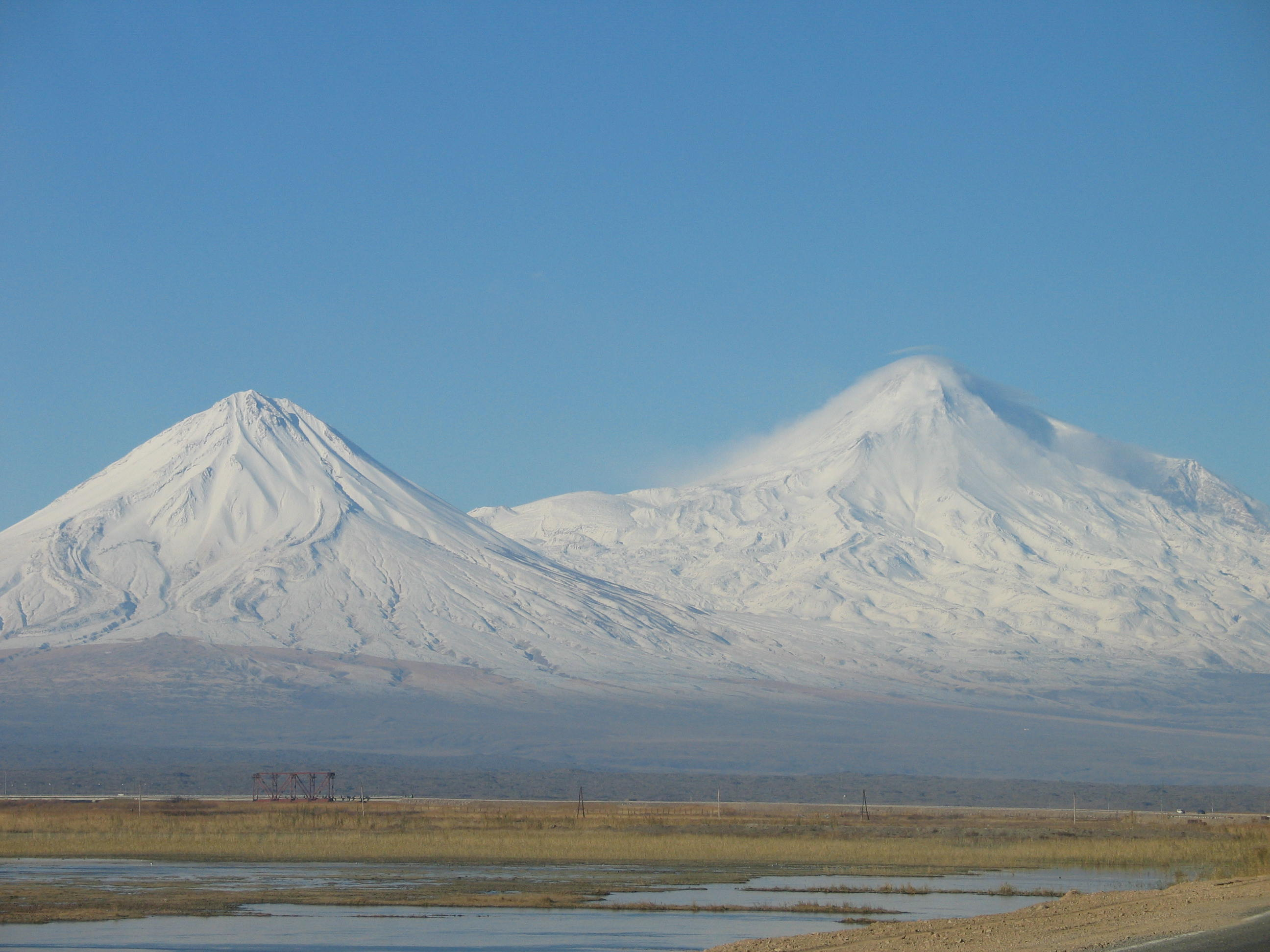 Küçük ve Büyük Ağrı Dağı. Fotoğraf Türkiye-Nahçıvan sınırının Nahçıvan tarafındaki bölgeden çekilmiştir.